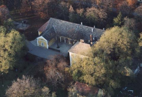 Árpádhalom Károlyi-Berchtold Mansion